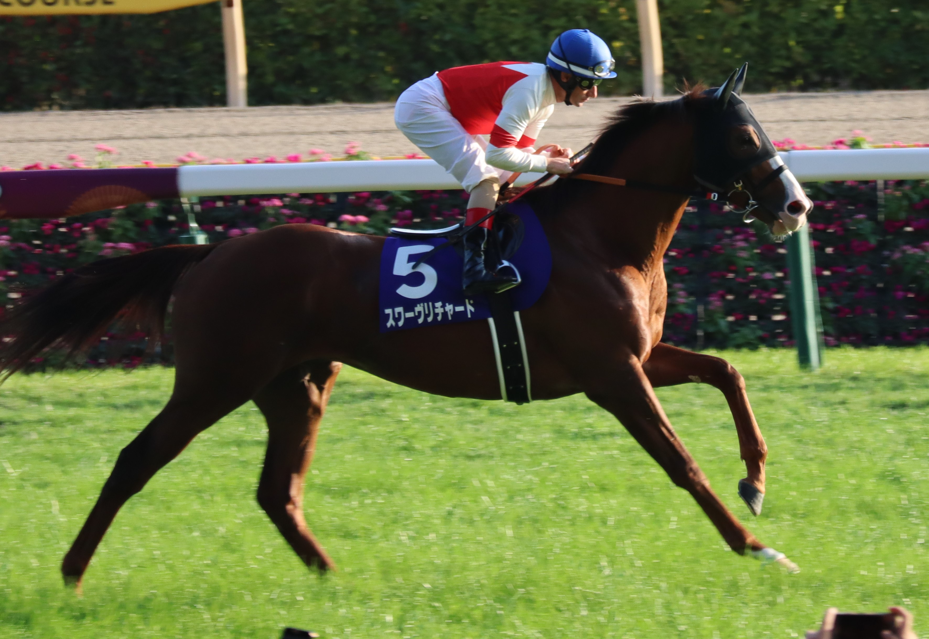 第158回天皇賞(秋)出走時